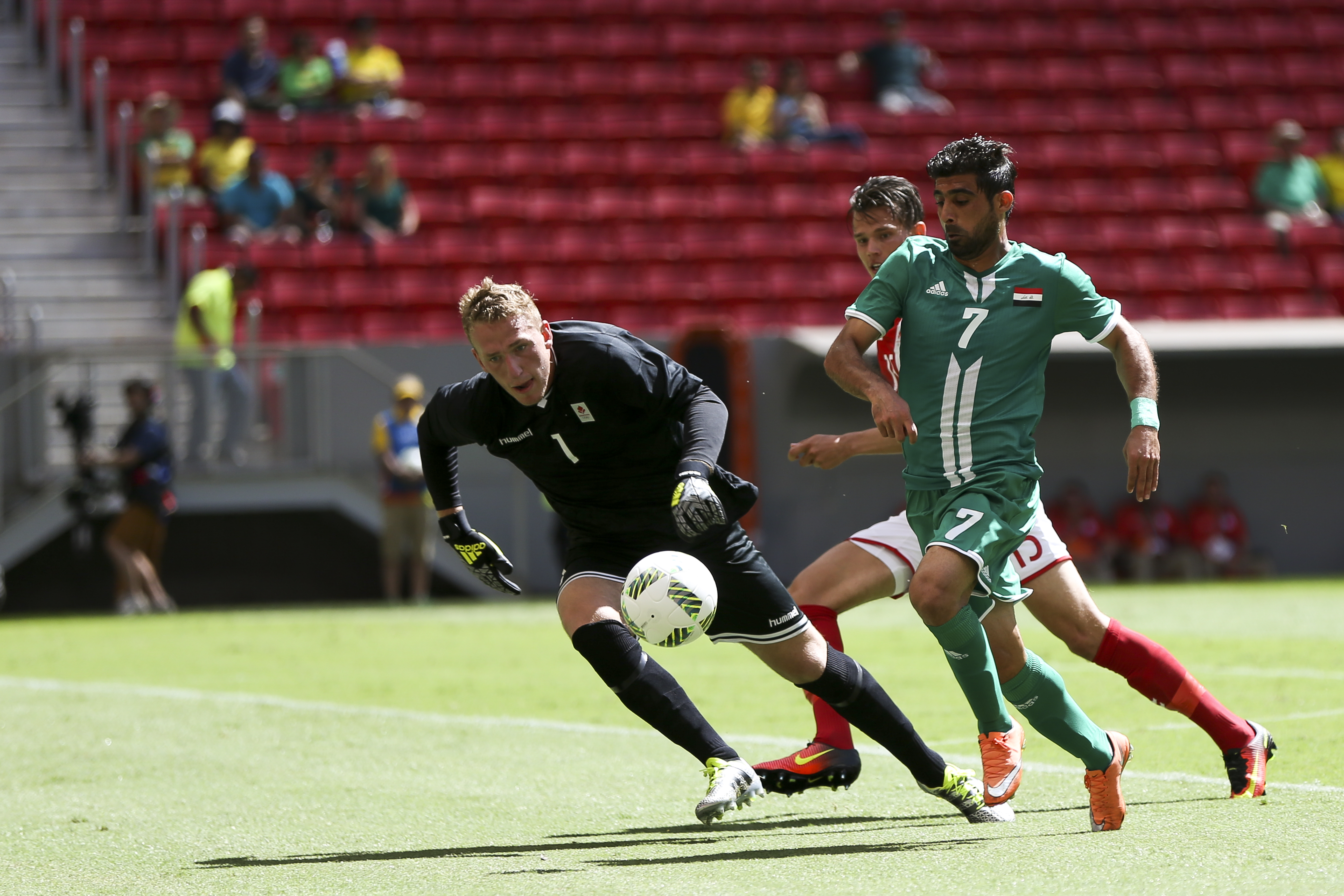 Brasília - A seleção do Iraque enfrenta a seleção da Dinamarca pela primeira fase do futebol olímpico, no estádio Mané Garrincha ( Marcelo Camargo/Agência Brasil)